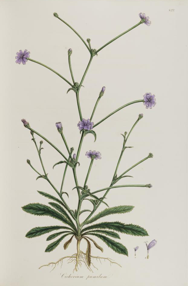 Legende: a Zungenblüte (x1). A Zungenblüte (vergr.).